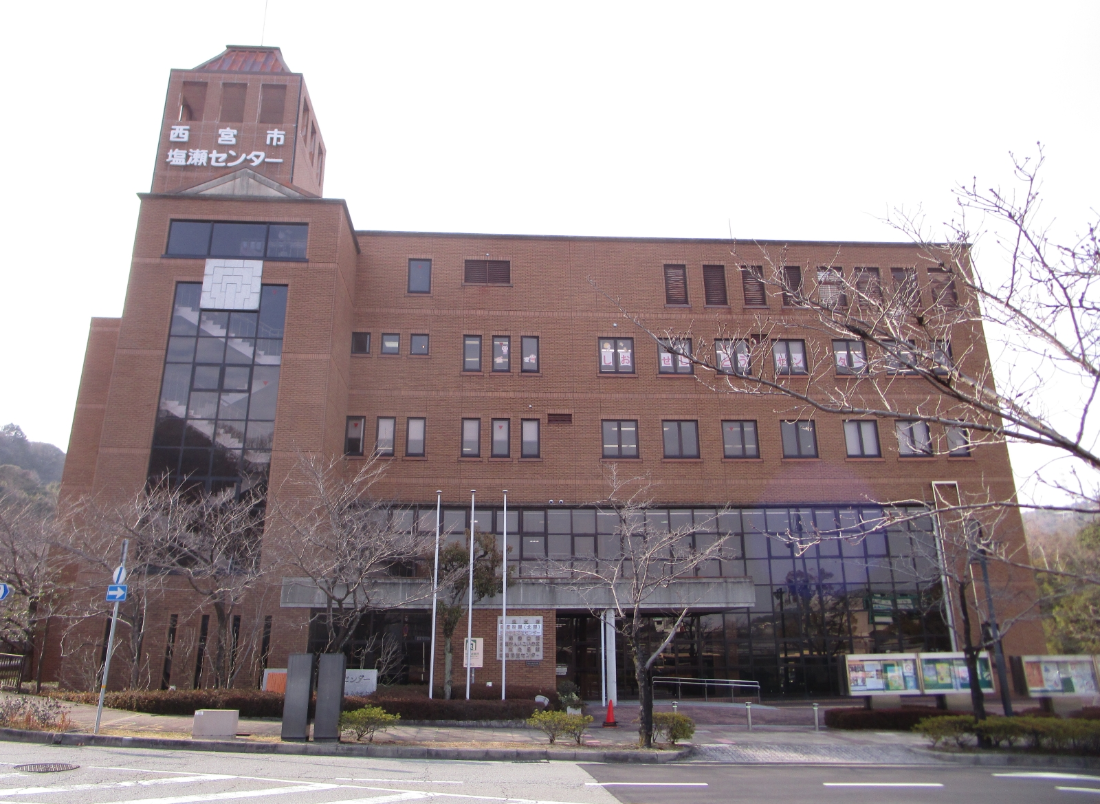 西宮市役所塩瀬支所（塩瀬センター）